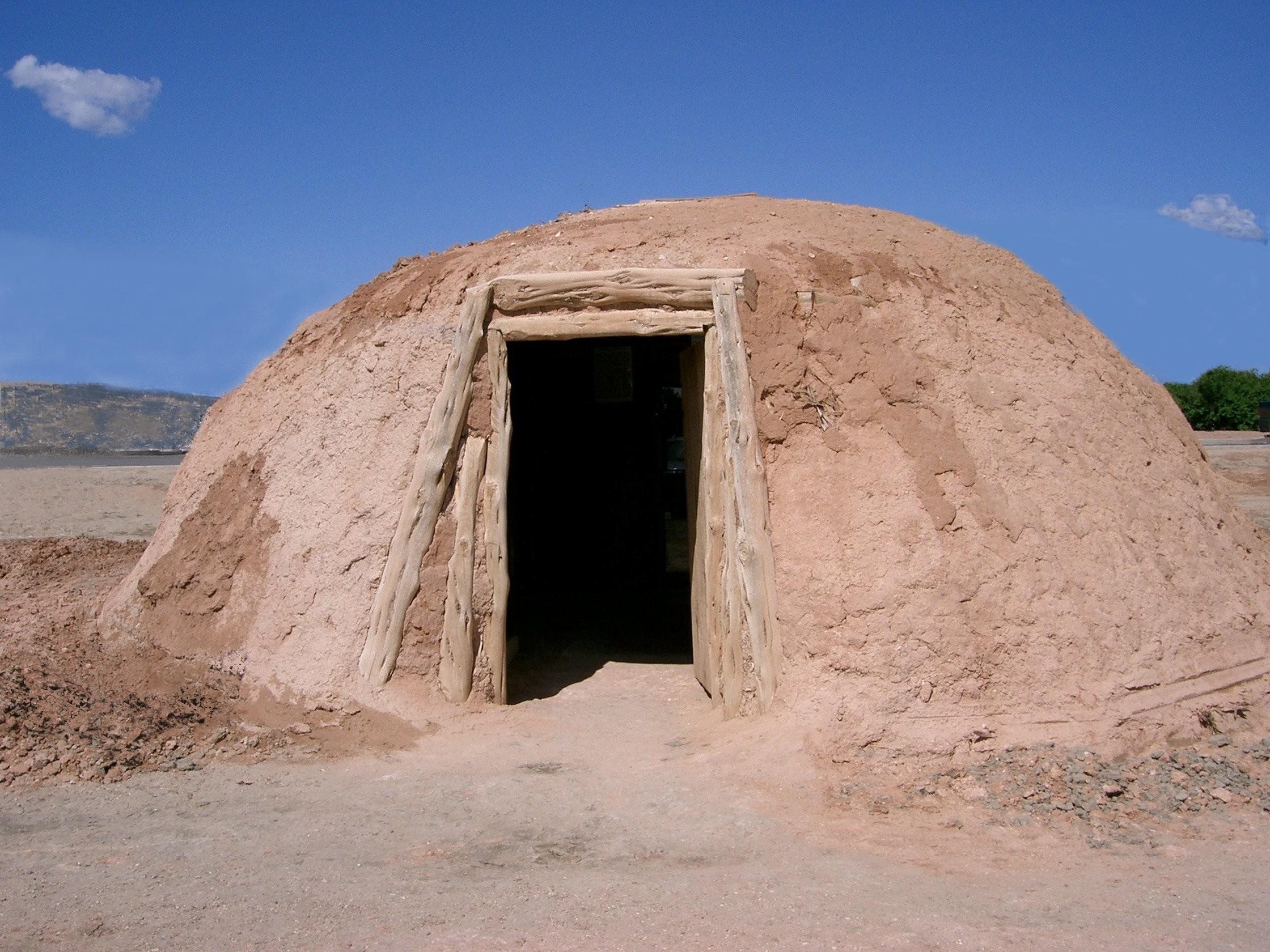 Le hogan est la maison traditionnelle des Indiens Navajos. Reconstruction moderne pour touristes (musée en plein air).